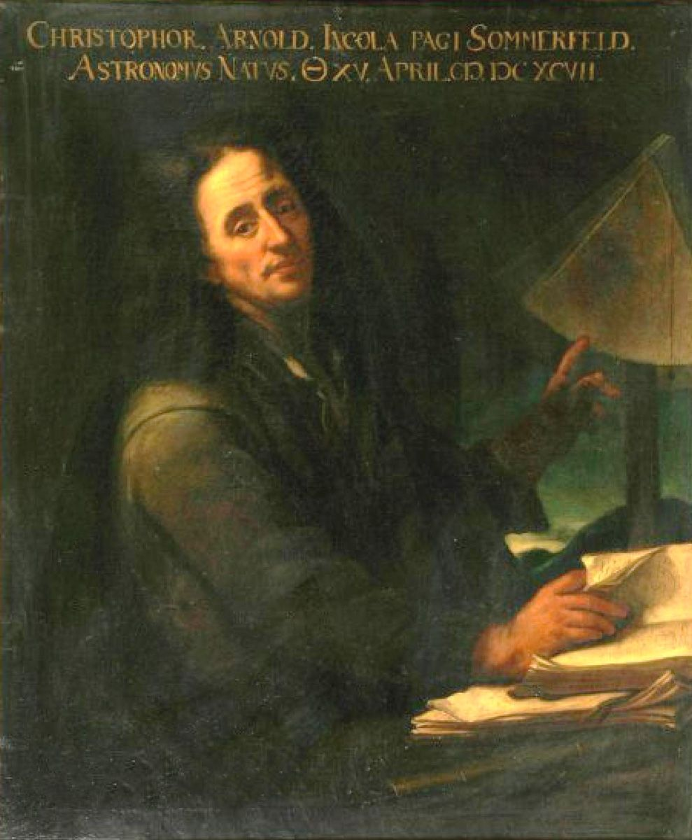 Bild des Astronomen Christoph Arnold (1650–1695) (Bildinschrift fehlerhaft)